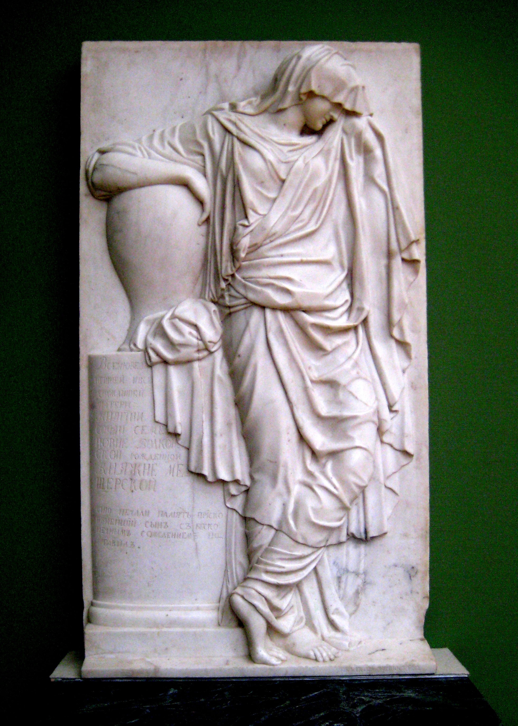 Надгробие княгини Софьи Семеновны Волконской, ур. Мещерской. 1782 год. ГТГ.